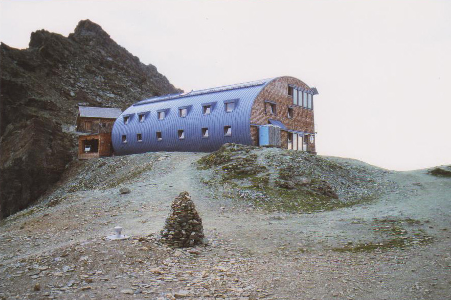 Stüdlhütte